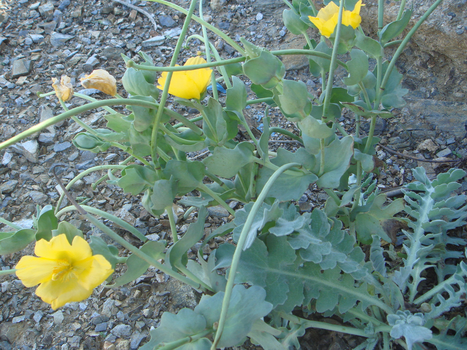 Glaucium flavum, Ceuta, España.